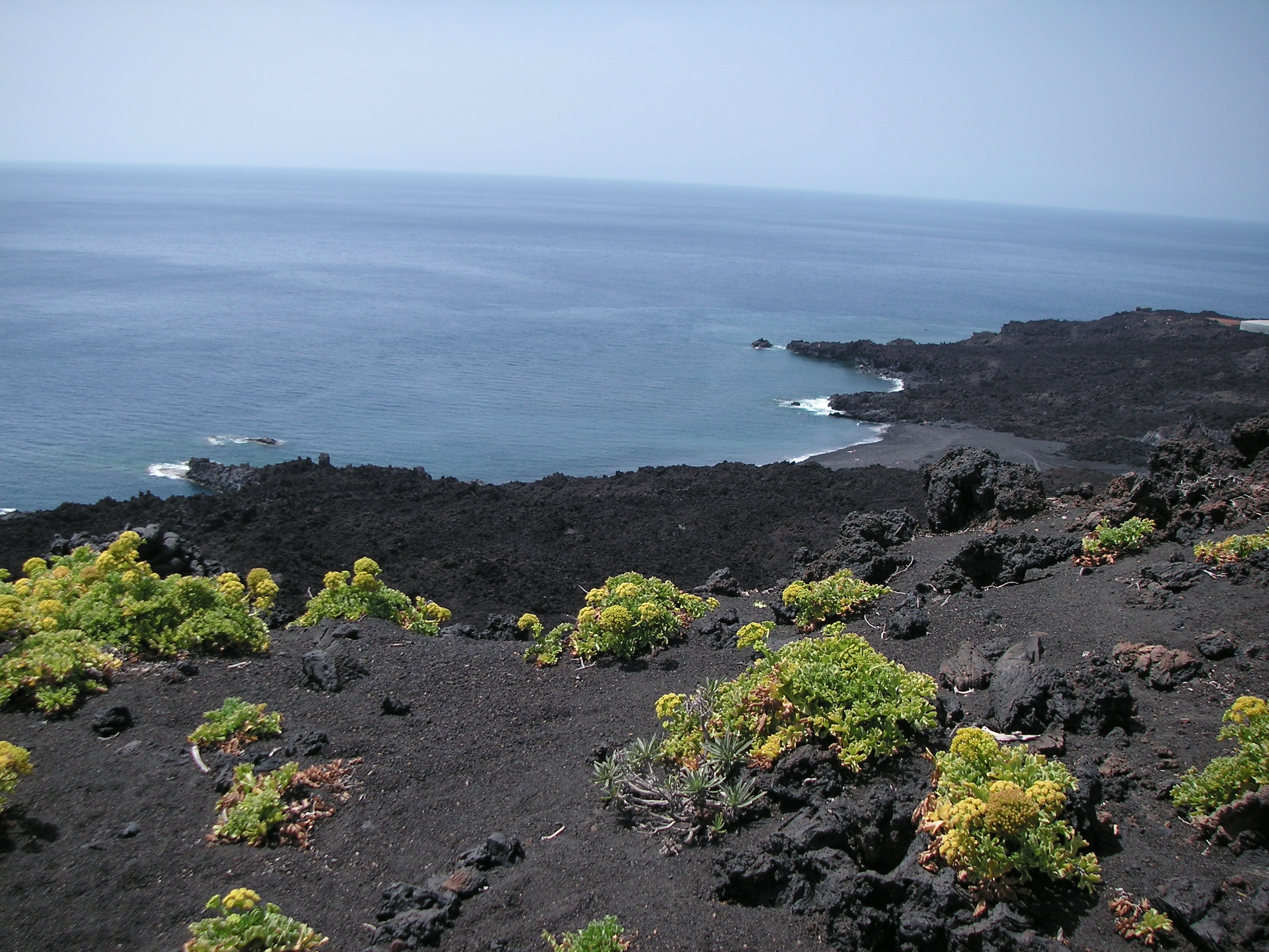 Lava-Küste im Süden der kanarischen Insel La Palma.